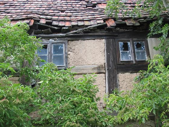 Haus Schweinemeister, Stangenhagen, Brandenburg